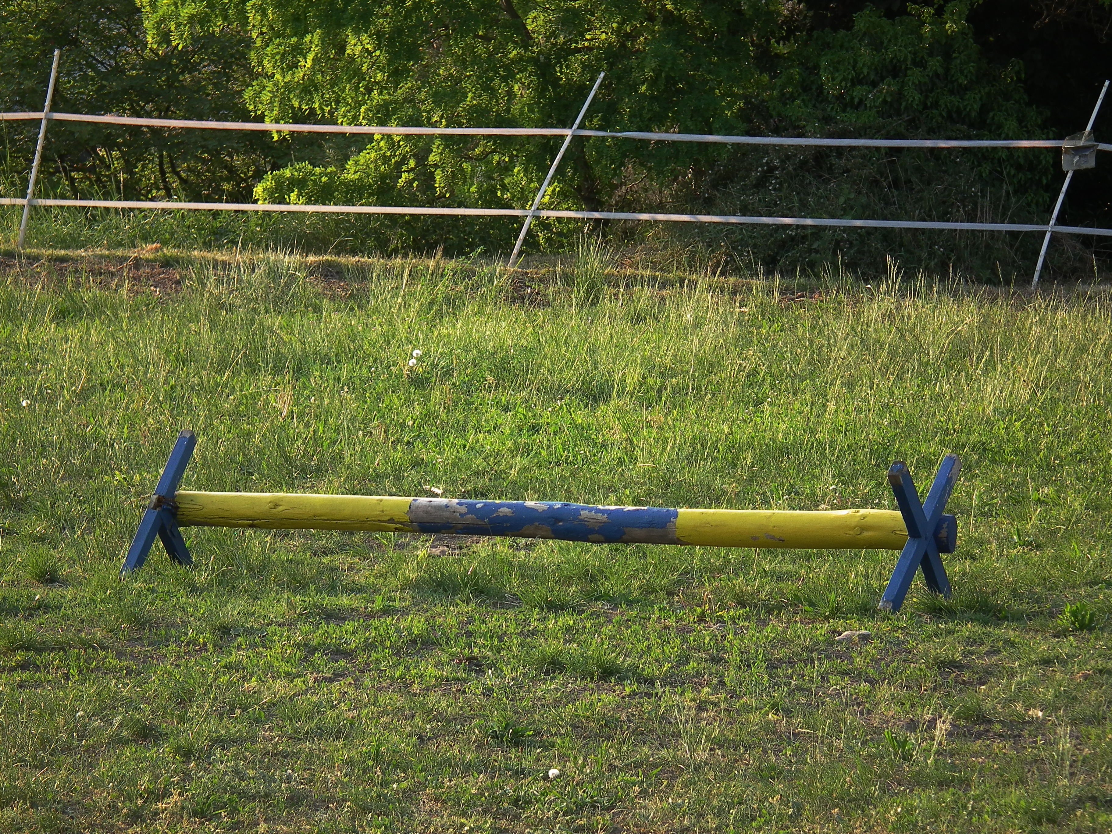 Blau-gelbes Cavaletti auf einer Pferdekoppel